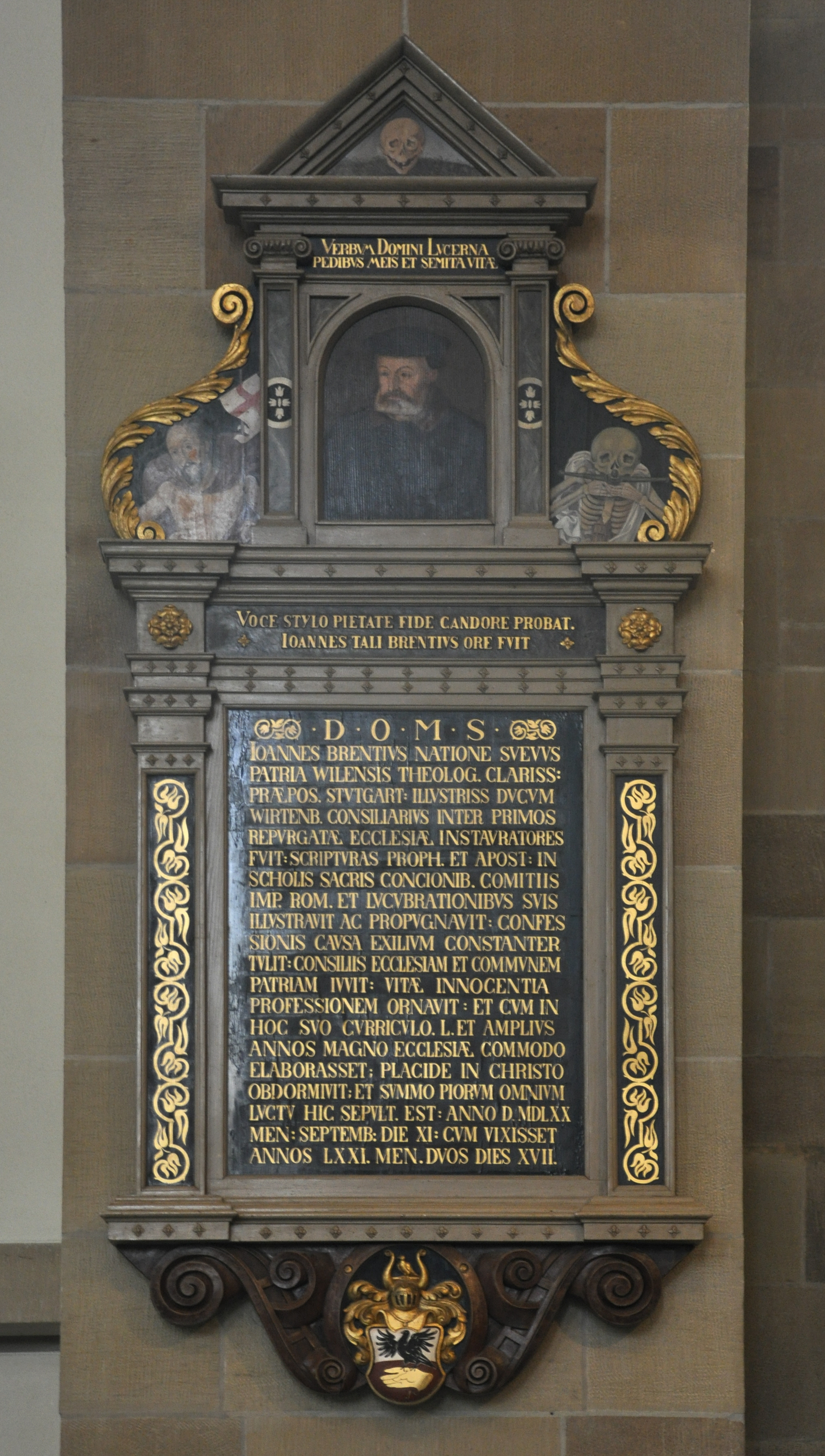 Stuttgart, Stiftskirche, Epitaph des Reformators Johannes Brenz († 1570), Rekonstruktion nach Kriegszerstörung, Portraitbildnis original (1584 von Johann Sautter aus Ulm)